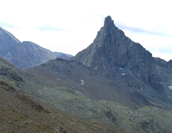 Tete des Toillies Cottische Alpen